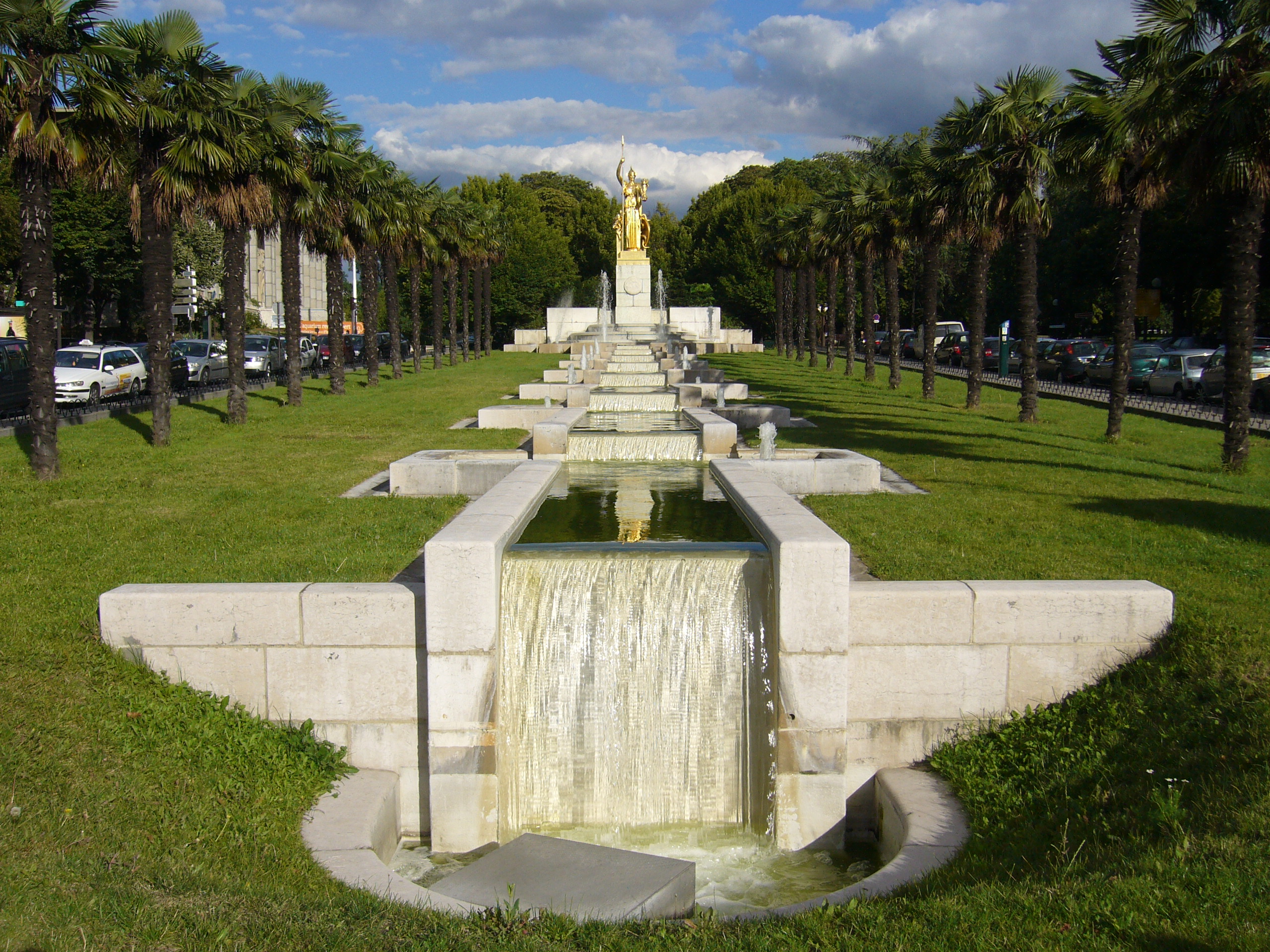 La statue d'Athéna devant les fontaines de la Porte Dorée